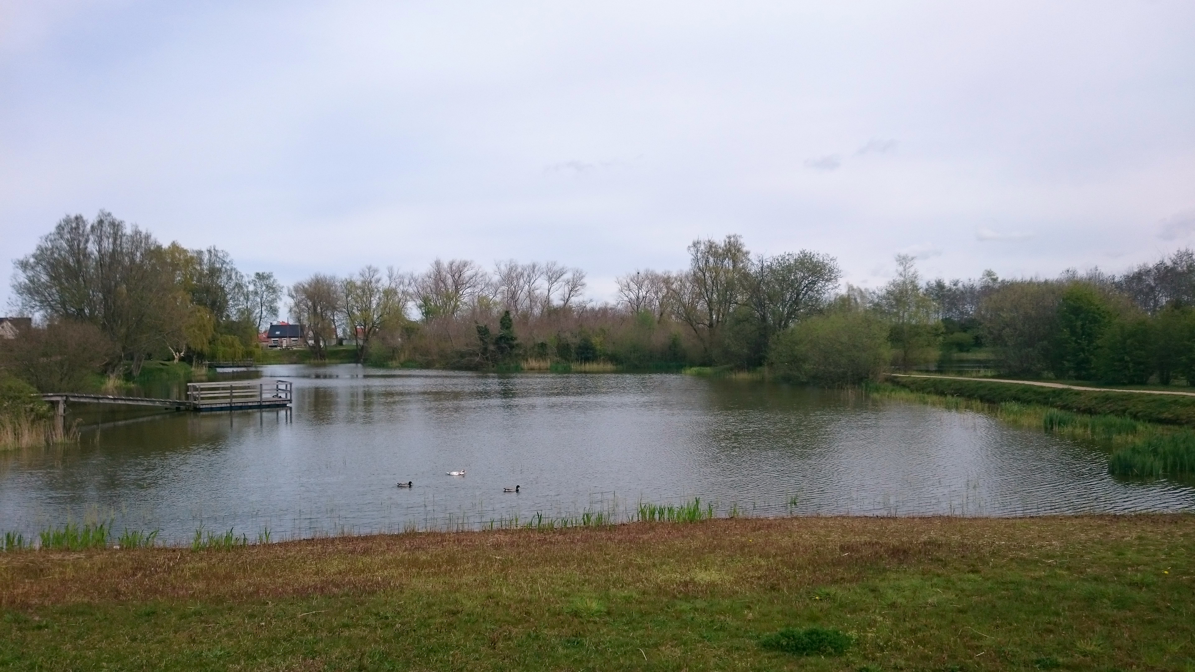 Les étangs Markey à Adinkerke.